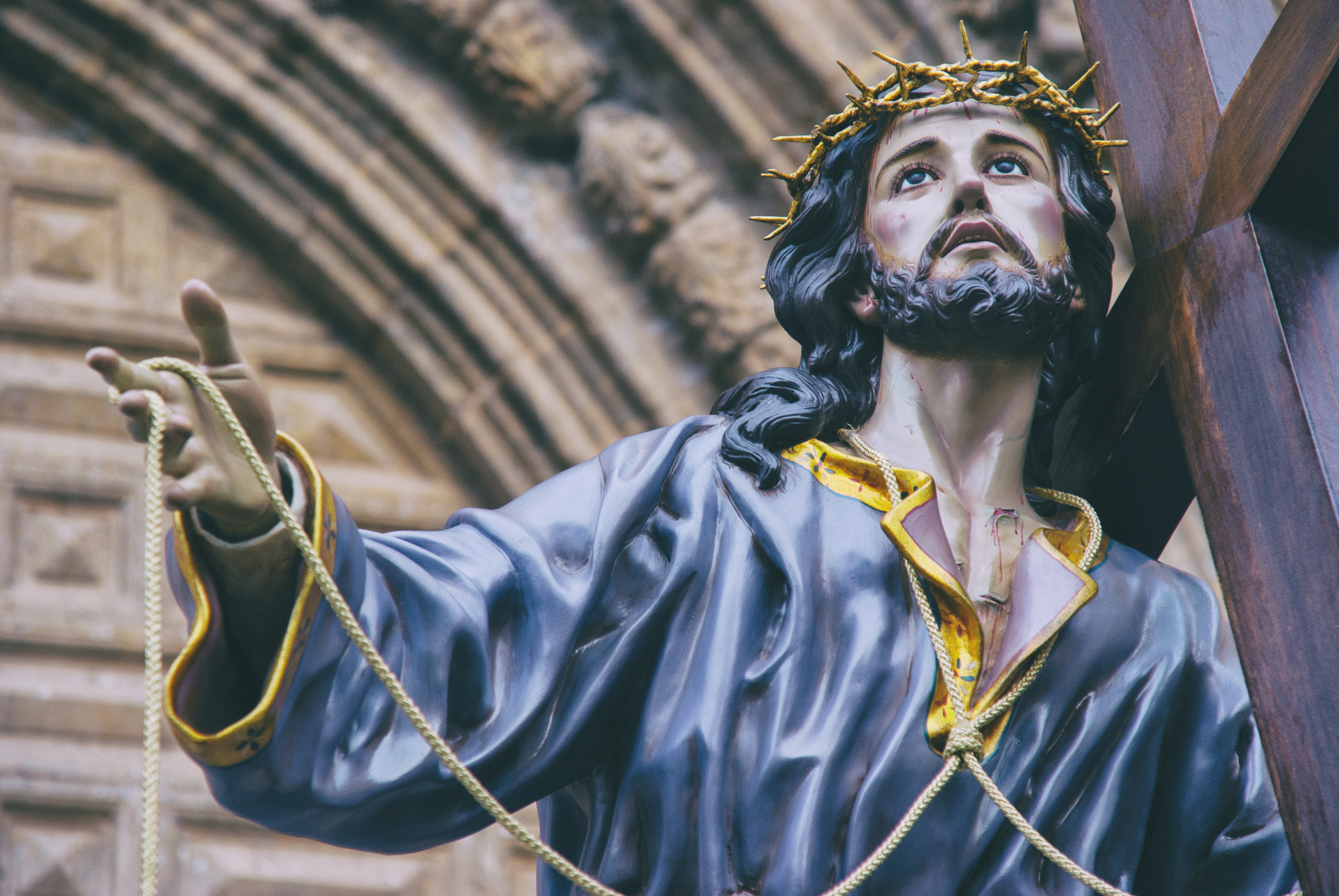 Calvario de Cristo en el Viernes Santo de la Semana Santa de Callosa de Segura. This is a photography of a Folklore festival in Spain (Wikidata id Q23662985).